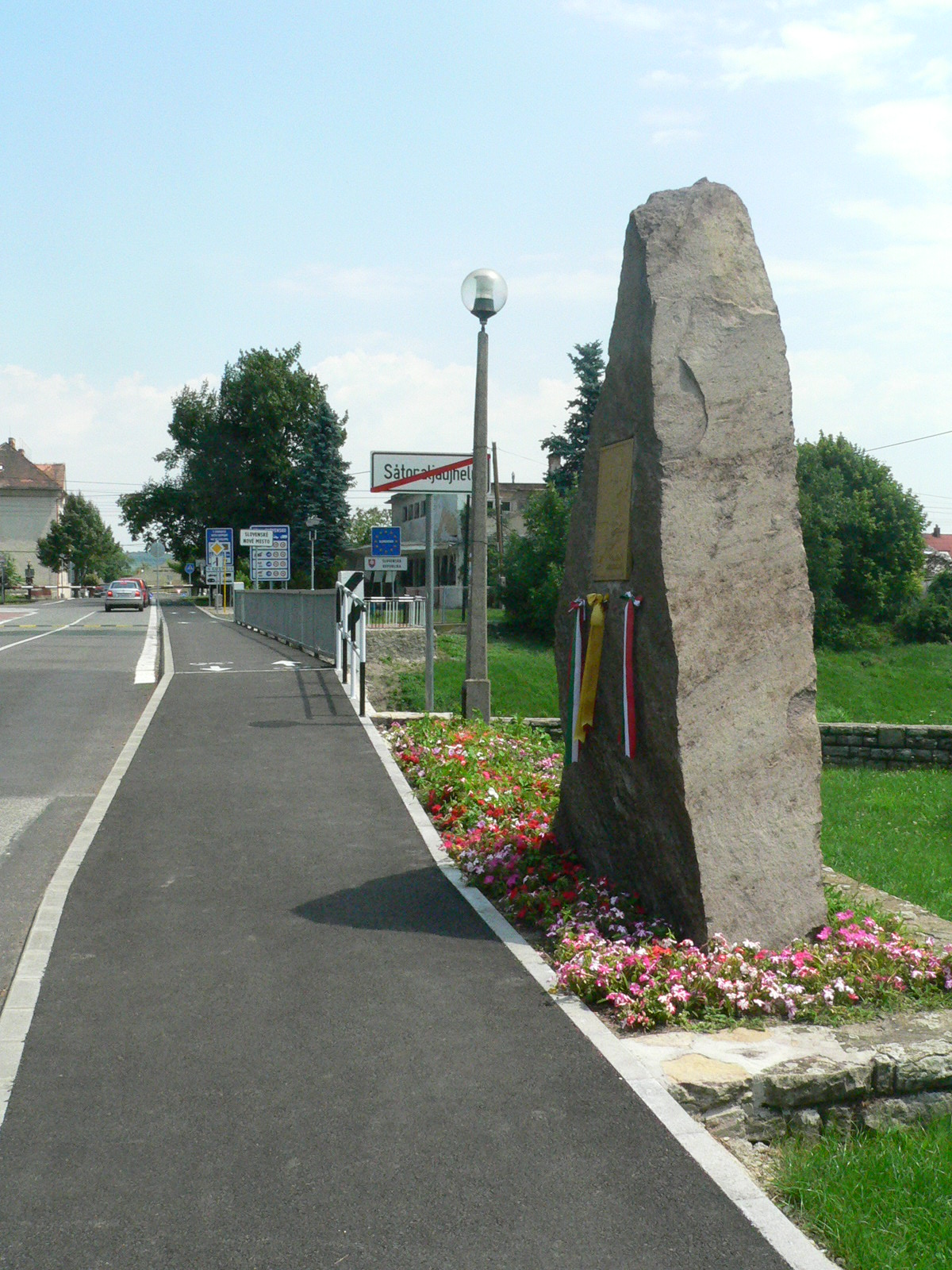 Az egykori Zemplén vármegye kettévágásának emlékműve Sátoraljaújhelyen